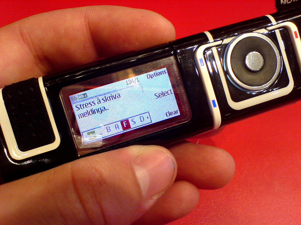 Nokia 7280